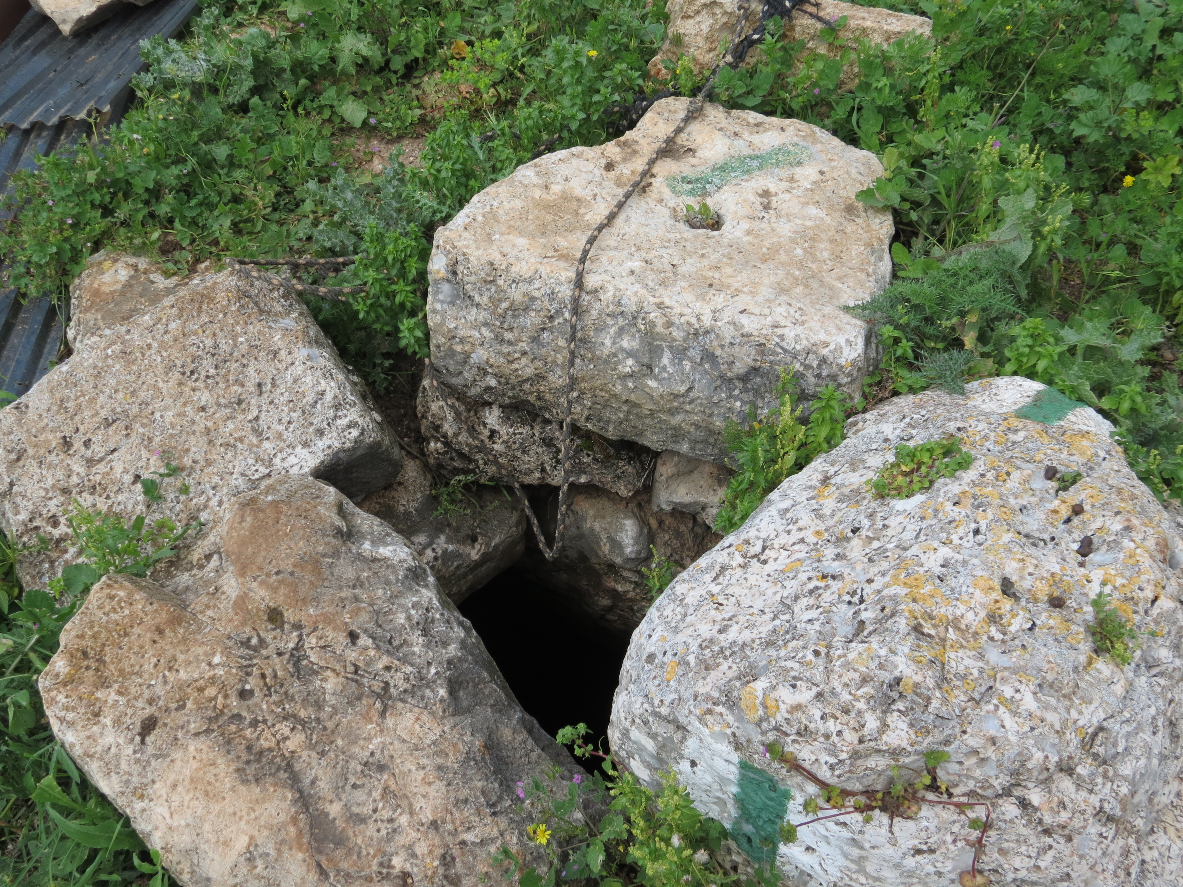 חורבת מחוז